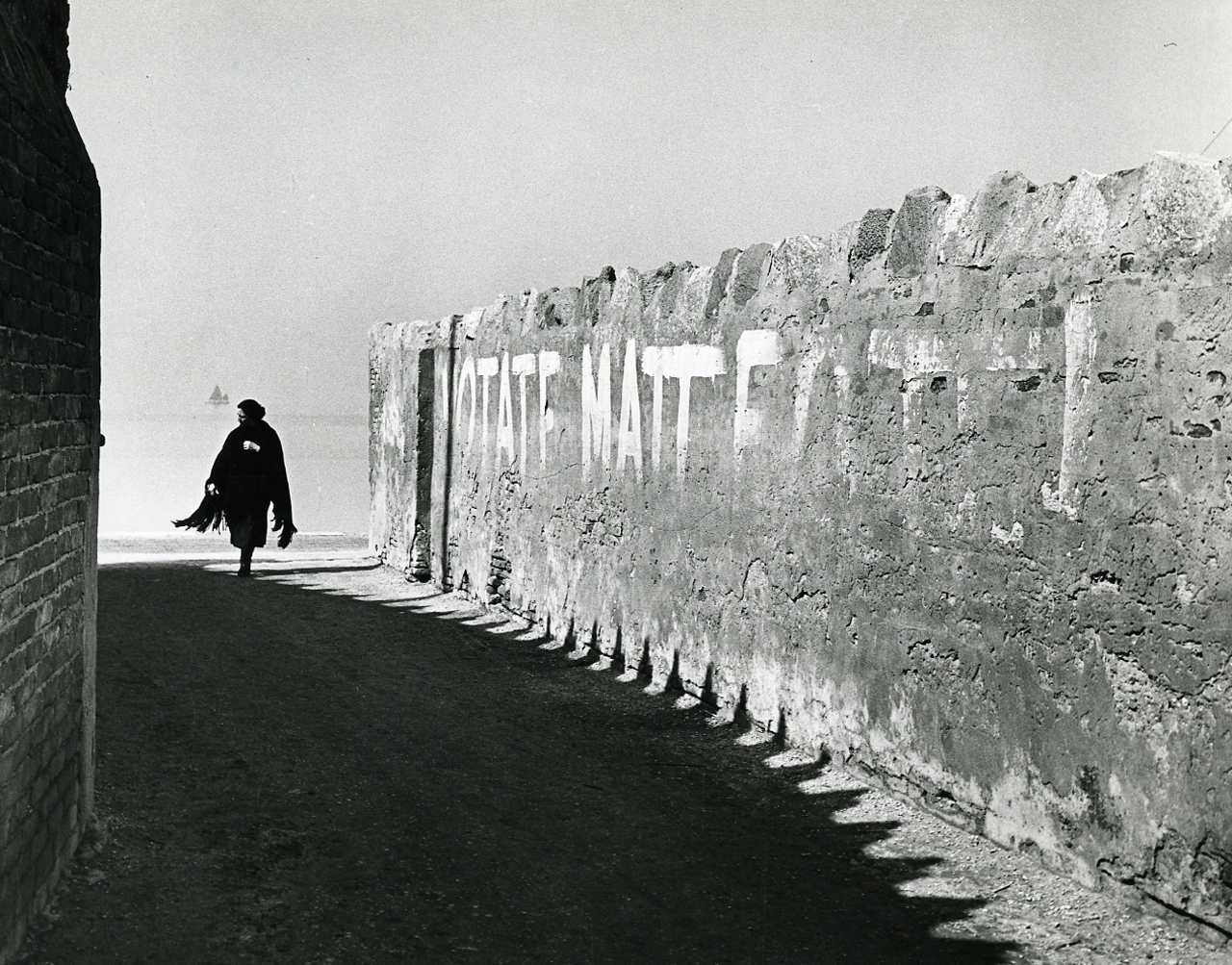 Serie fotografica : Venezia, 1965 / Paolo Monti. - Stampe: 5 : Positivo b/n, gelatina bromuro d'argento/ carta, 24x30. - ((Al verso delle stampe iscrizioni documentarie? manoscritte a matita: "PAD."; timbro a inchiostro con copyright: "© Copyright/ Credit to/ Paolo Monti/ Corso Sempione [...]/ Milano". - Sul coperchio della scatola iscrizione didascalica manoscritta a pennarello nero: "Venezia".